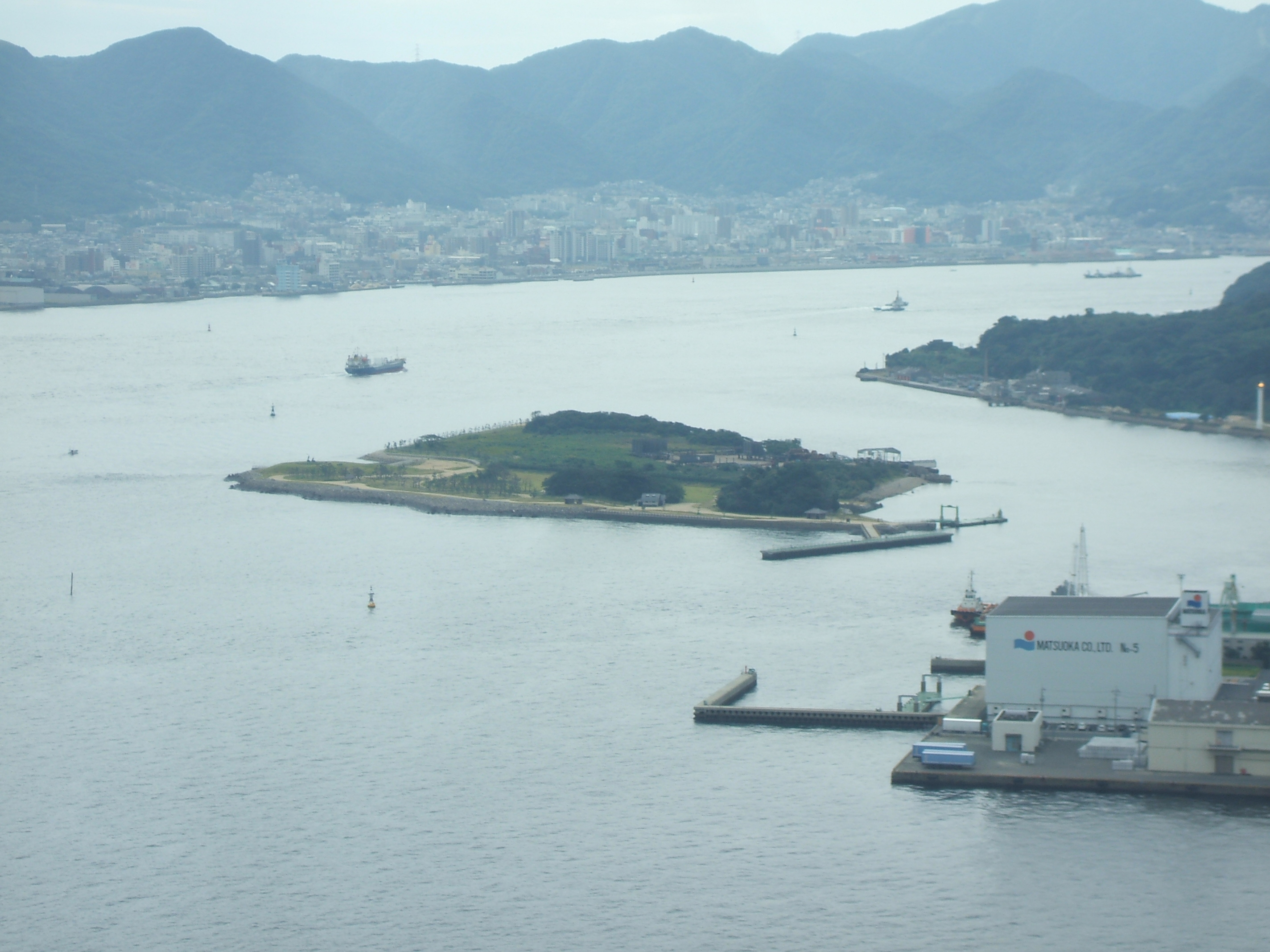 山口県下関市にある船島(巌流島)。 Category:日本の島画像 Category:下関市の画像